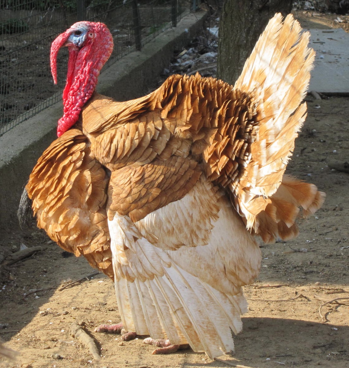 Dinde ou Dindon rouge des Ardennes (France)